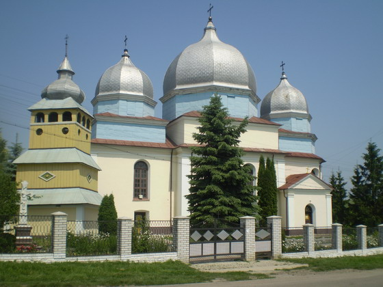 Церква села Дзвинячка